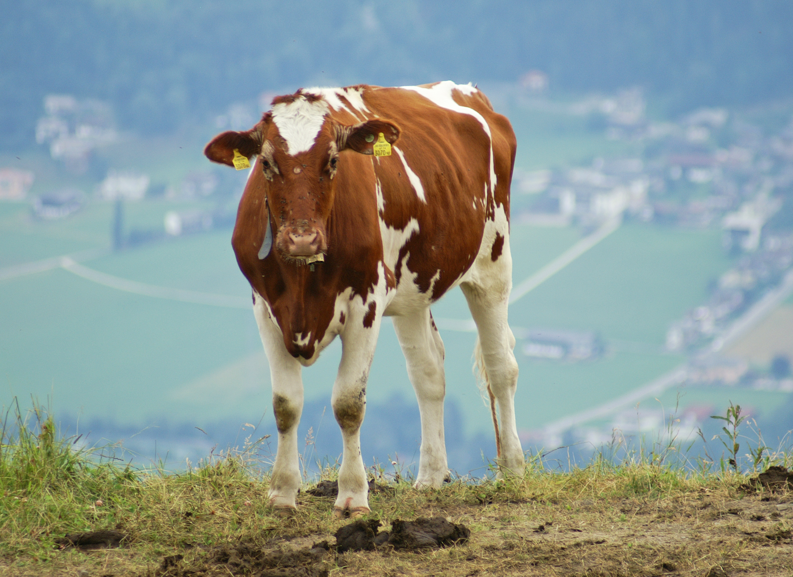 “kein Hochlandrind”, sondern ein Ayrshire Cattle neben der Bergstation Spieljochbahn. Blick auf Fügen und Hart im Zillertal, Tirol